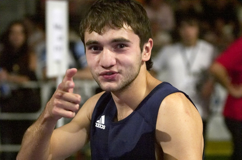 Кубок Мира 2005 г